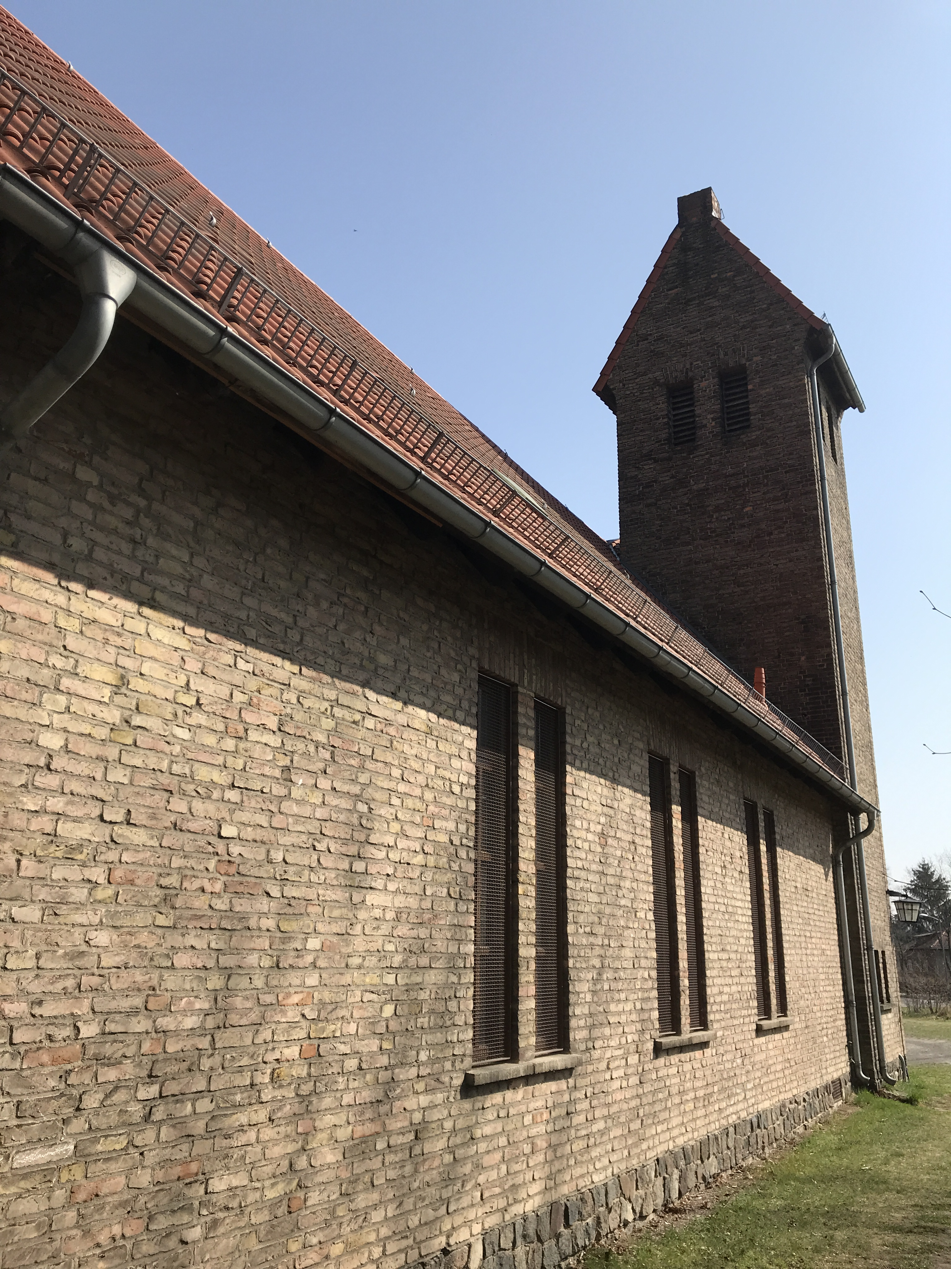 Die Kreuzkirche Schulzendorf entstand in den Jahren 1951 und 1952 unter der Leitung von Jakob Wassum in Schulzendorf, Landkreis Dahme-Spreewald.